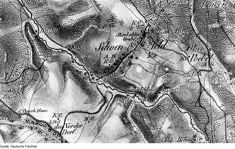 Original image description from the Deutsche Fotothek Schmiedeberg-Schönfeld. Oberreit, Sect. Altenberg, 1821